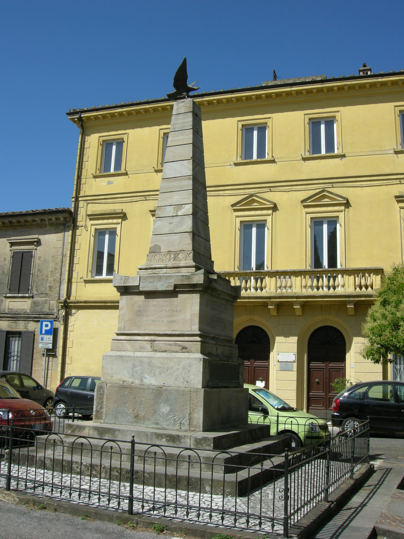 Collesalvetti, obelisco